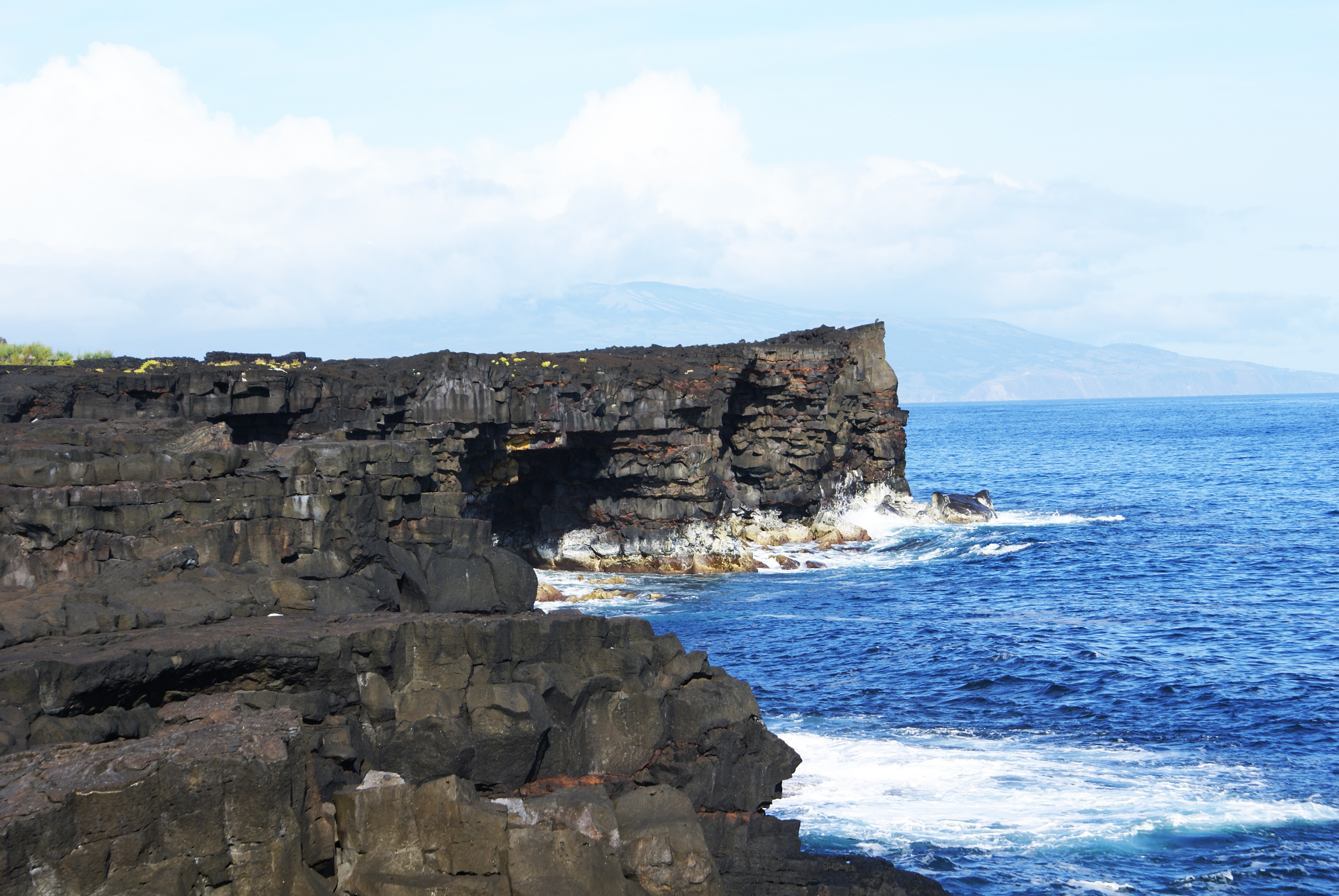 Paisagem Protegida de Interesse Regional da Cultura da Vinha da ilha do Pico, onde a lava encontra o mar, Santa Luzia, Concelho de São Roque, Açores, Portugal